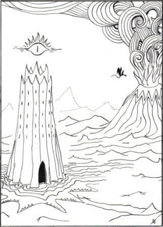 La torre oscura de Barad-dûr.